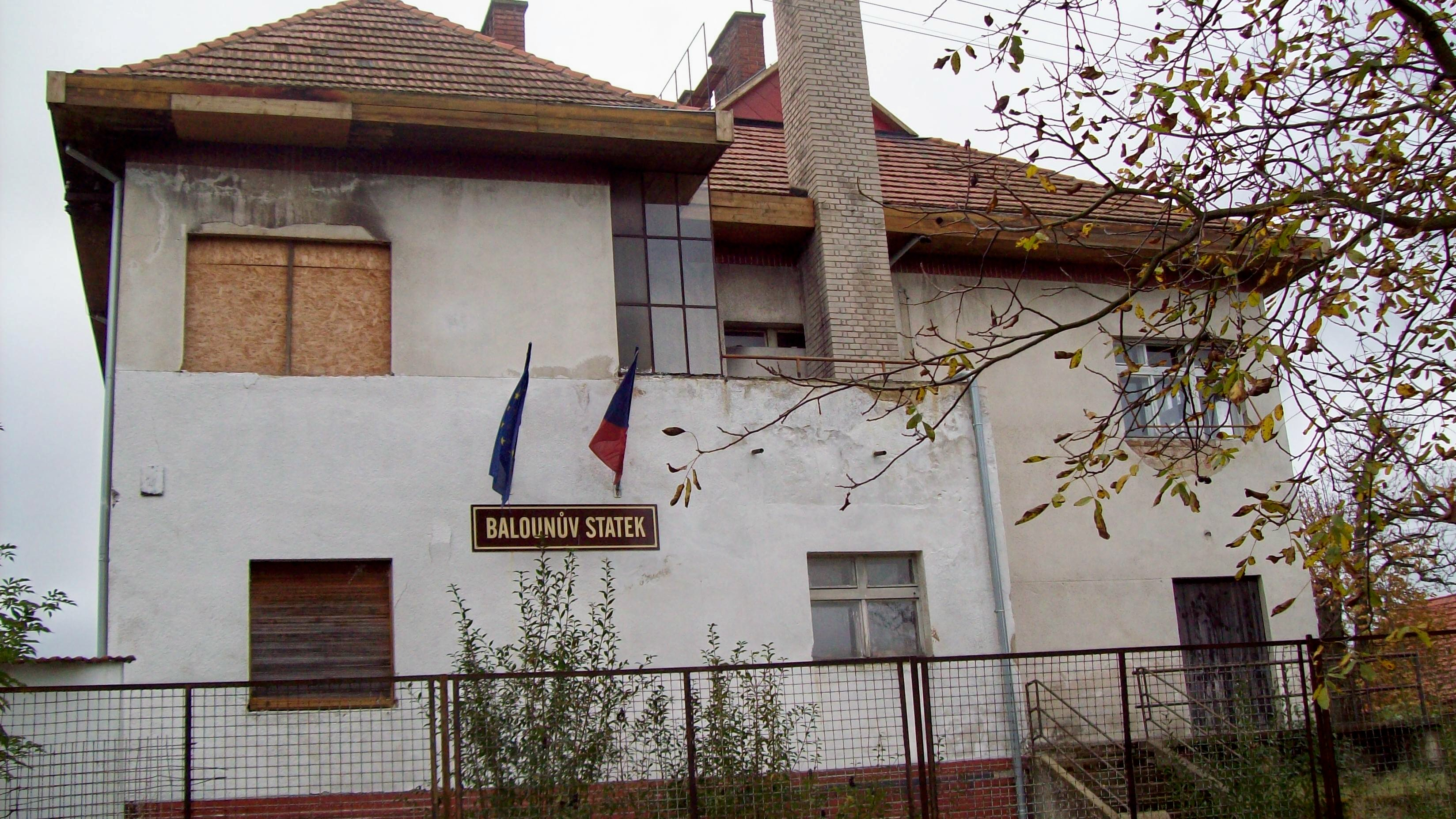 Balounův statek, Střemy čp. 3, okres Mělník.